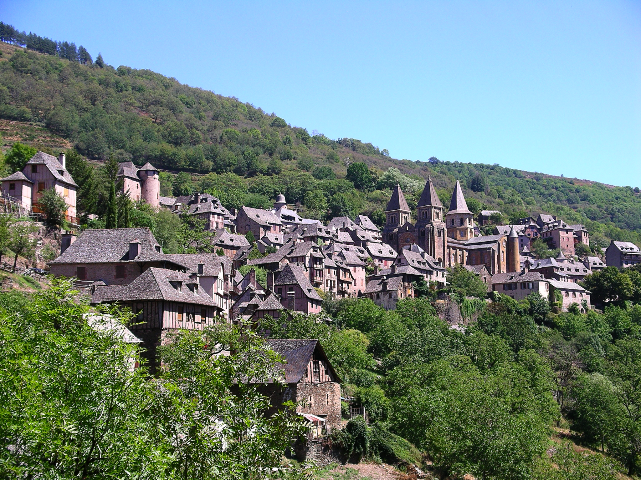 Vue du village de Conques ( Aveyron, France )